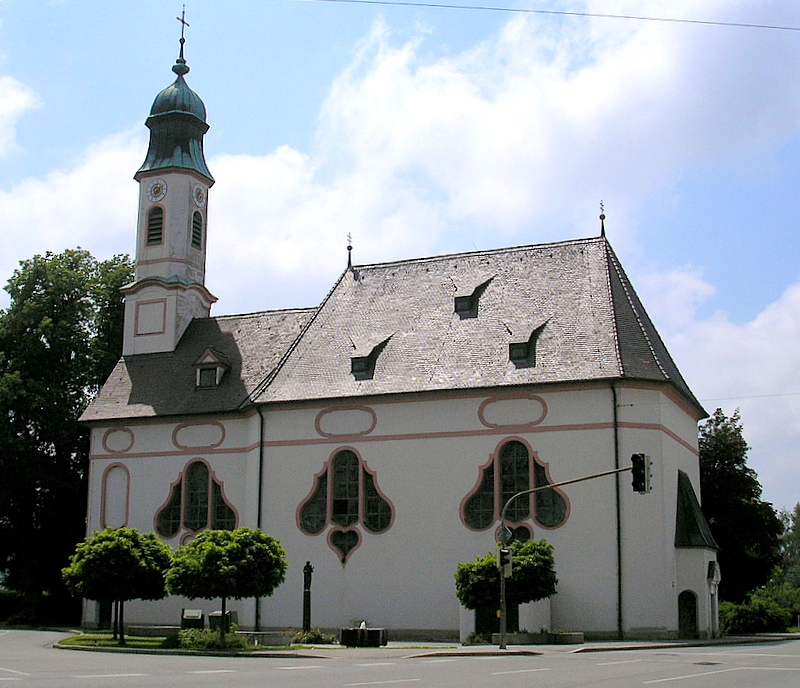 Wallfahrtskirche zu Unserer Lieben Frau (Bobingen, Landkreis Augsburg, Bayerisch-Schwaben). Gesamtansicht von Norden. Eigene Aufnahme, Okt. 2007 / Pilgrimage church of Our Lady (Bobingen near Augsburg, Bavaria, Germany). Total view from the north. Own photo, Oct. 2007